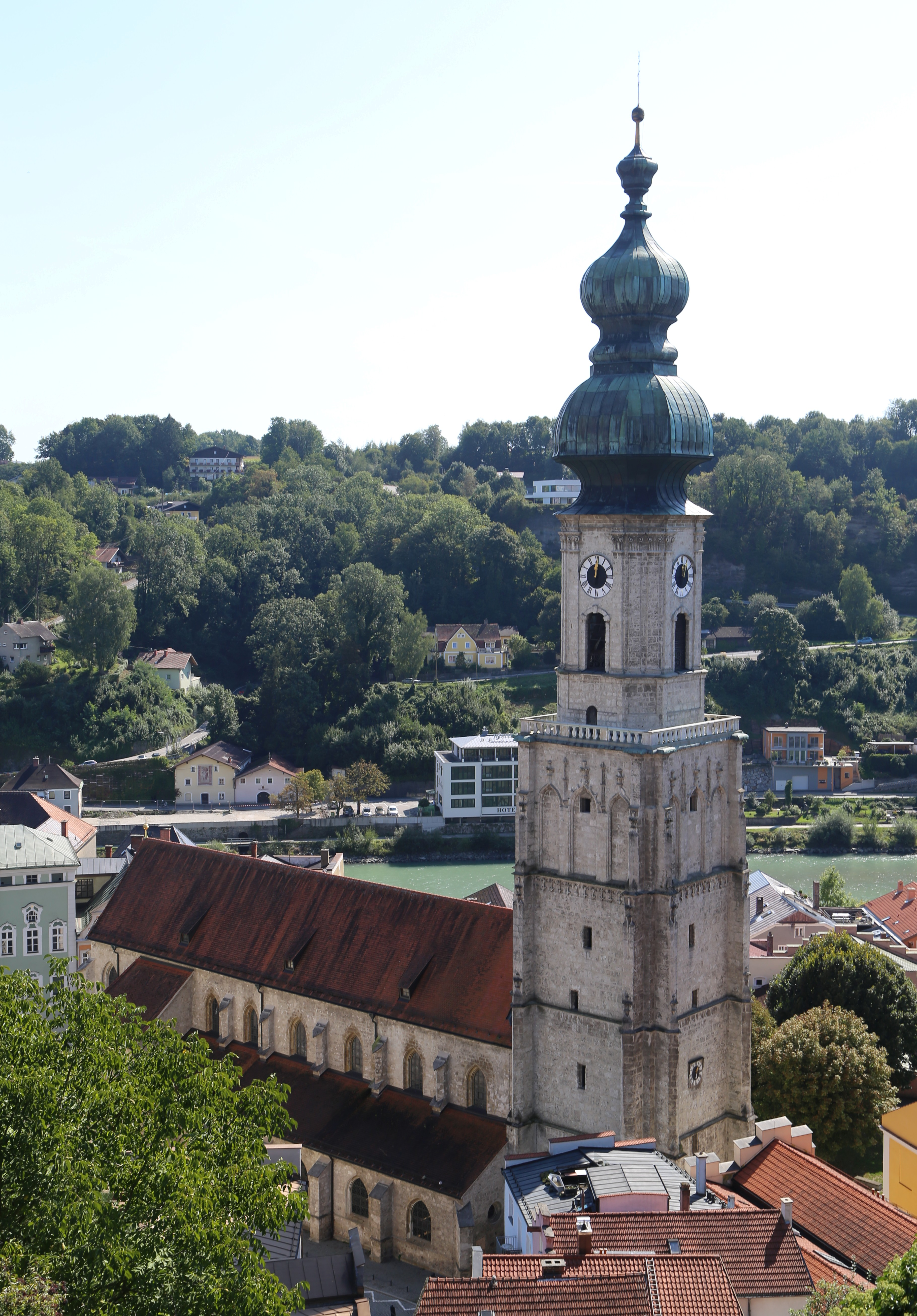 Messerzeile 19, Burghausen; Katholische Stadtpfarrkirche St. Jakob; unverputzter Tuffquaderbau mit Westturm, das Turmobergeschoss mit vielfach gegliederter barocker Kuppel, dreischiffige querschifflose Basilika, nach 1353, Grundsteinlegung zum Turm 1470, nach Einsturz des südlichen Teils des Kirchenschiffs Neubau 1851 durch Franz Joseph von Denzinger, Restaurierung 1969/70